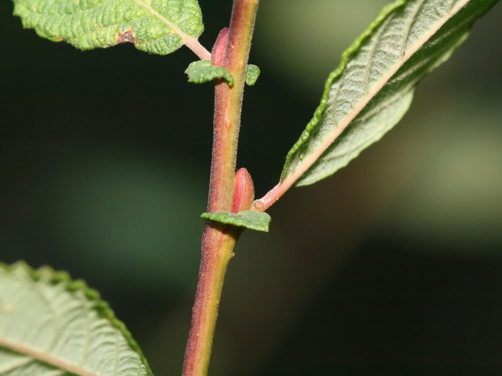 Ohr-Weide (Salix aurita)